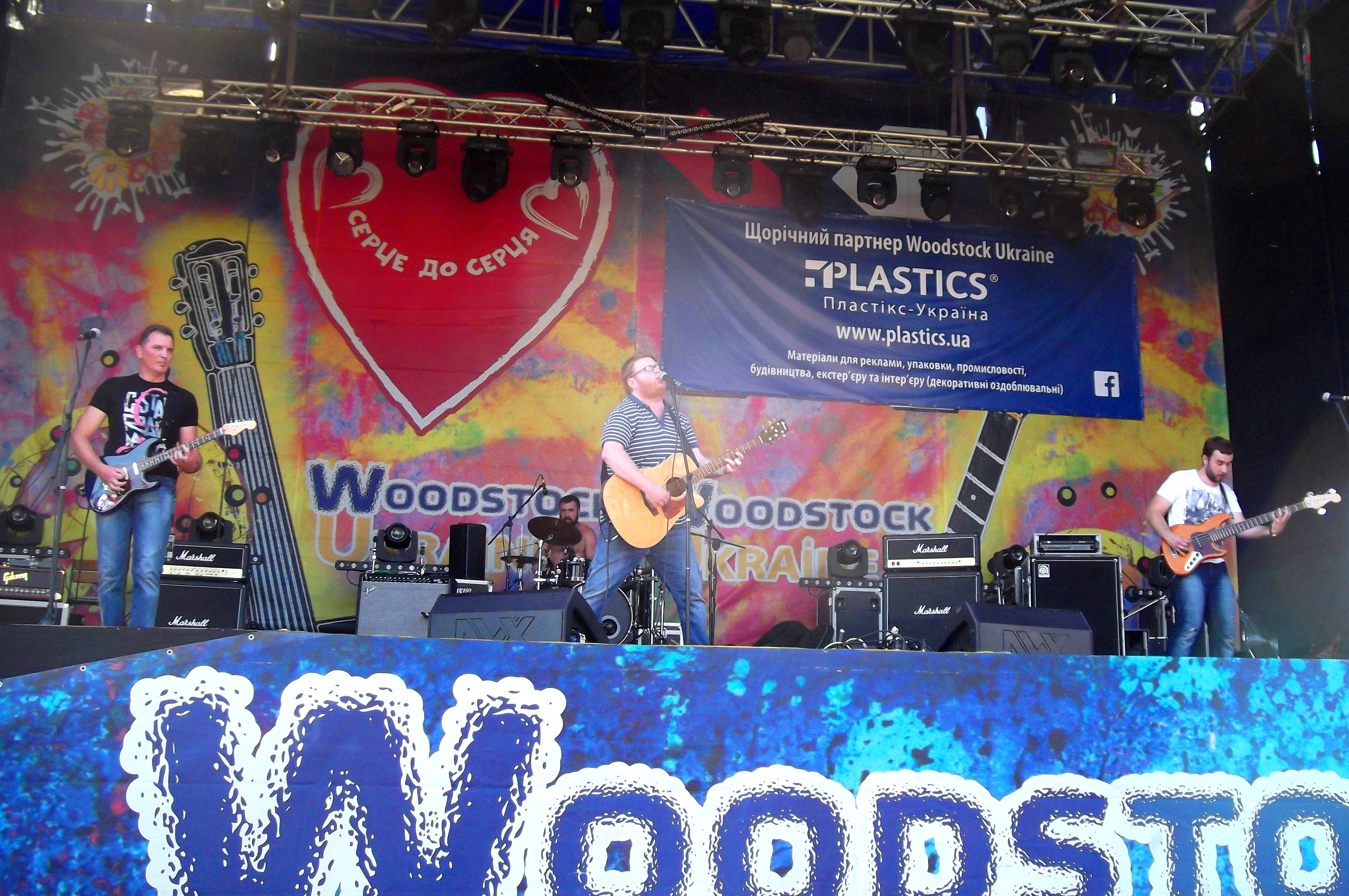 Гурт SWEETLO на фестивалі WOODSTOСK Україна 2015 в селі Свірж (Перемишлянський район Львівської області), 08.08.2015 р.